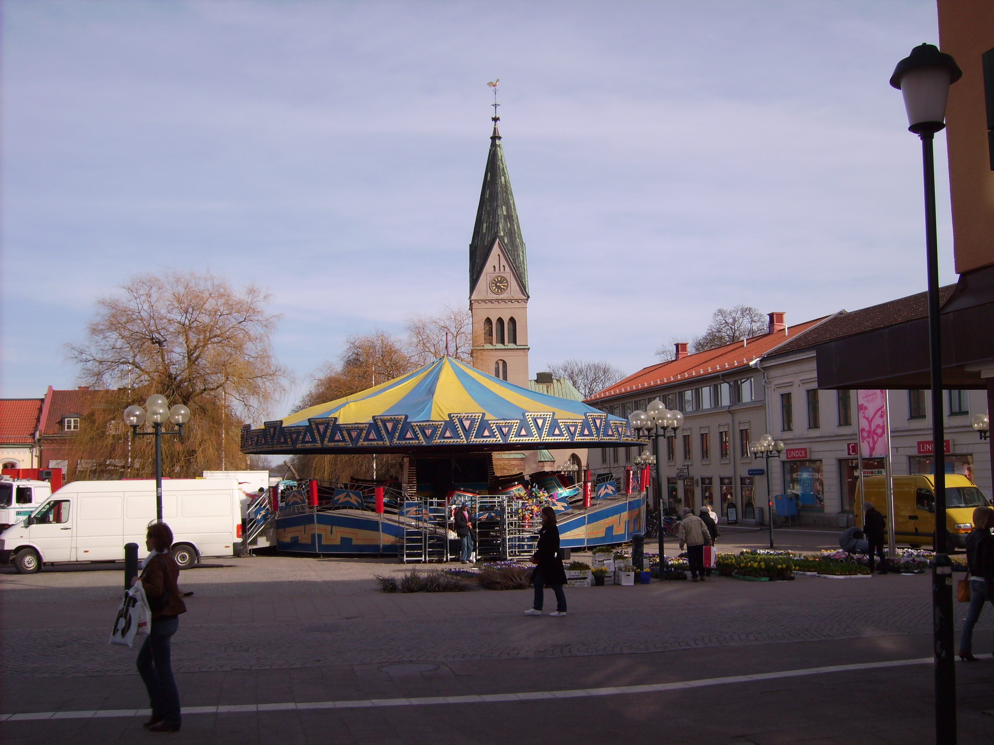 Bilden är fotograferad av Harri Blomberg. Photo by Harri Blomberg.